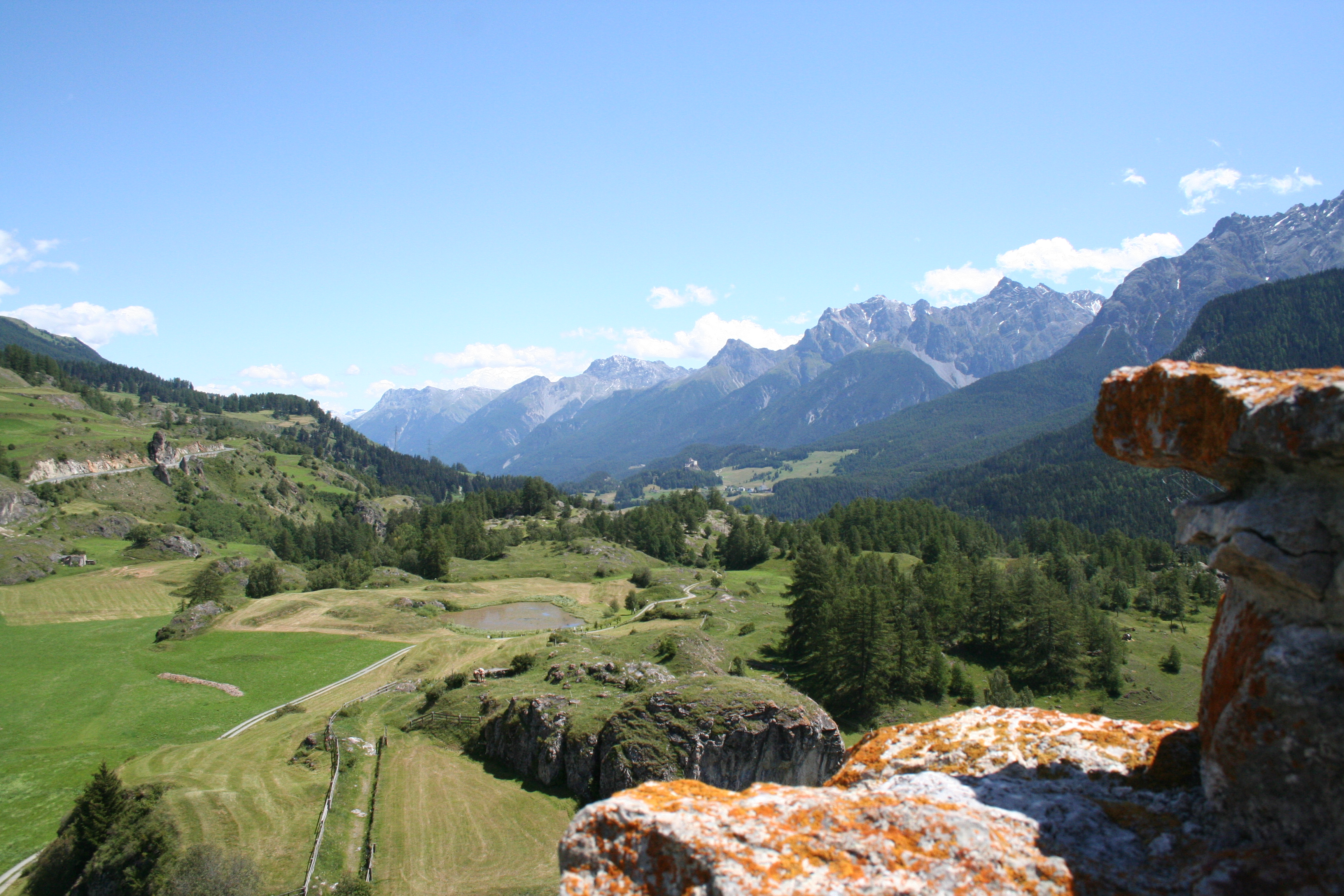 Unterengadin östl. Ardez